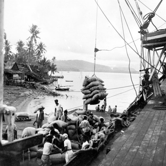 Repronegatief. Laden van kopra in de haven van Paré Paré te Sulawesi